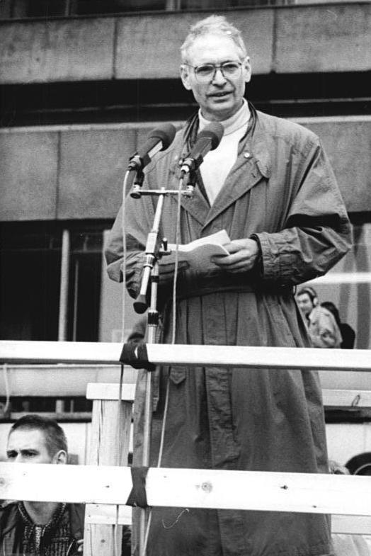 ADN-ZB Link 4.11.89 Berlin: Demonstration 500.000 Bürger beteiligten sich an einer Demonstration für den Inhalt der Artikel 27 und 28 der Verfassung der DDR. Auf dem anschließenden Meeting auf dem Alexanderplatz ergriff auch Prof. Jens Reich vom "Neuen Forum" das Wort.